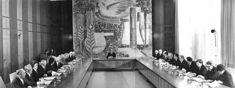 ADN-ZB-Koard 29.10.76 Berlin: Staatsrat der DDR konstituiert Am 29.10.76 trat der von der Volkskammer neugewählte Staatsrat zu seiner ersten (konstituierenden) Sitzung zusammen. Der Generalsekretär des ZK der SED und Vorsitzende des Staatsrates der DDR, Erich Honecker (M.), erklärte, daß mit der einmütigen Wahl des Staatsrates die Verpflichtung auferlegt ist, alle Kräfte dafür einzusetzten, um entsprechend den ihm übertragenen Aufgaben zur weiteren erfolgreichen Verwirklichung der Beschlüsse des IX. Parteitages der SED beizutragen.